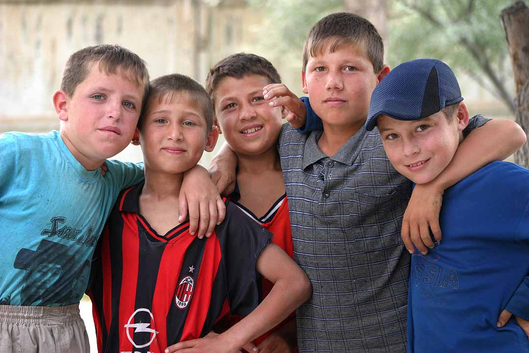 Tajikistani boys from Tajikistan.